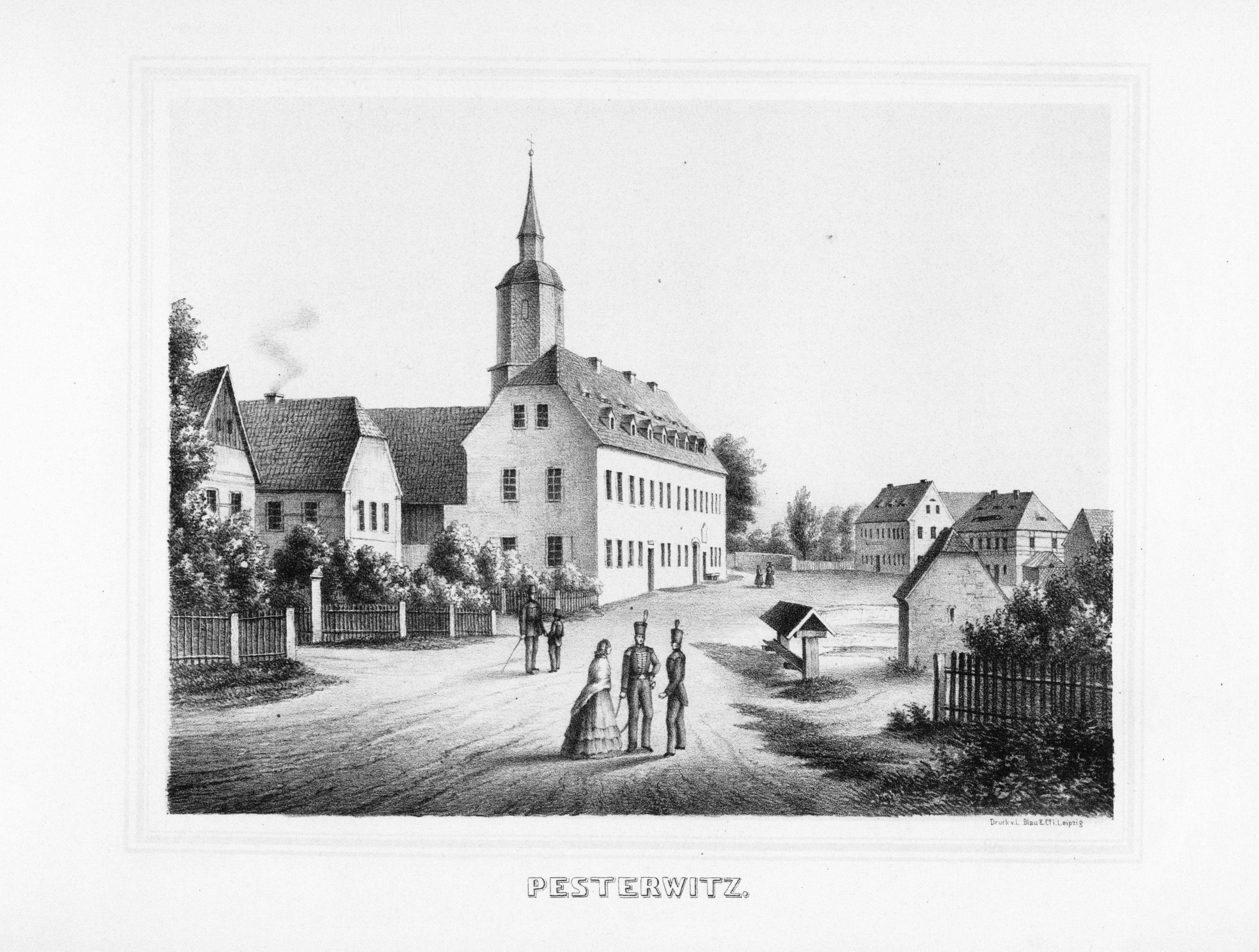 Pesterwitz aus: Album der Rittergüter und Schlösser im Königreiche Sachsen Meissner Kreis Section: II